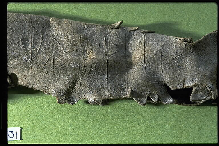 Inskriften på ena sidan lyder: Maria. Pater (noster). På den andra sidan upprepas ordet Pater. Motiv: Kat nr 031 Knivslida av läder Nyckelord: Runor Kategori: Runristning/runsten Inskriften på ena sidan lyder: Maria. Pater (noster). På den andra sidan upprepas ordet Pater.